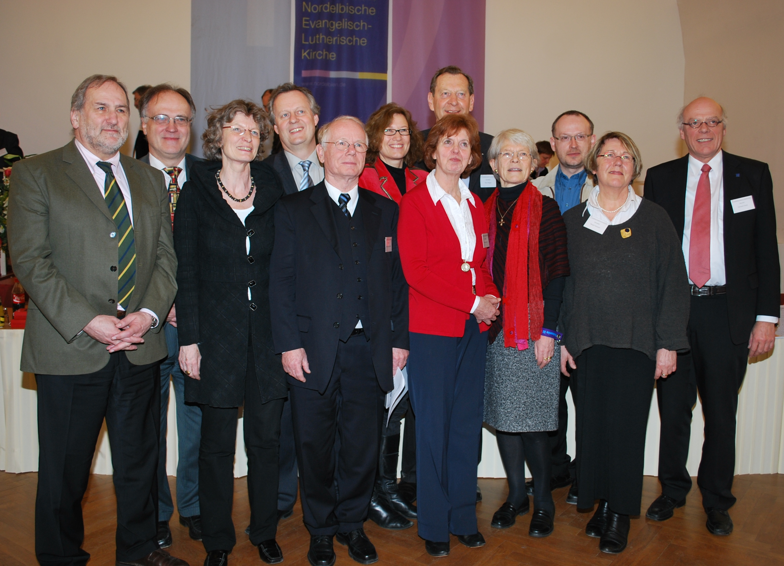 Die neuen Kirchenleitungsmitglieder der Nordelbischen Kirche, mit Bischöfin Jepsen (4. von rechts) und Bischof Ulrich (ganz rechts), während der Nordelbischen Synode vom 25.–27. Februar 2010 in Rendsburg, Deutschland.